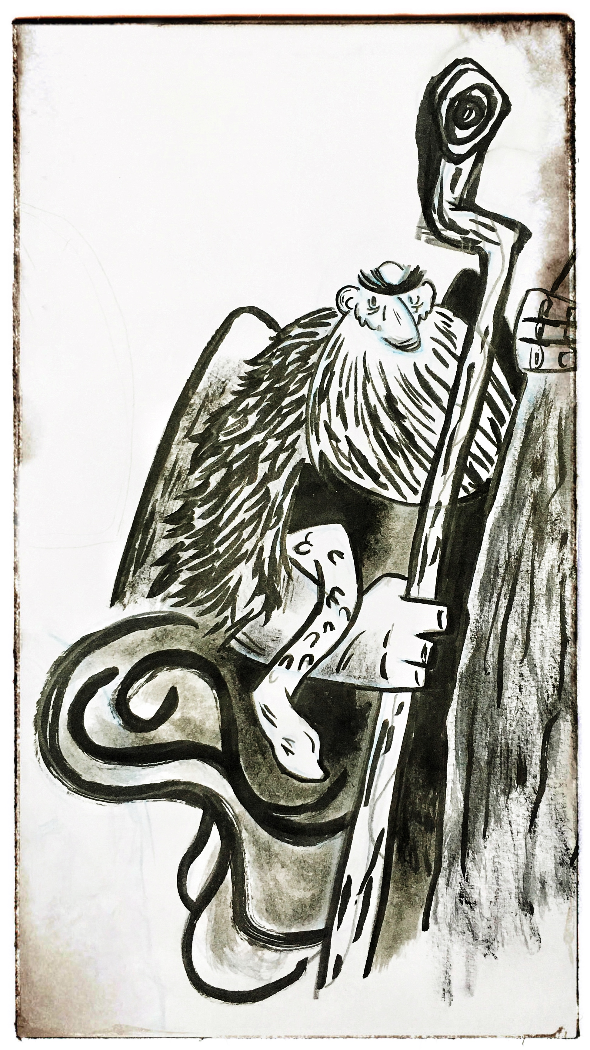 Un Nubeiro creando os banco de neboas entre as montañas